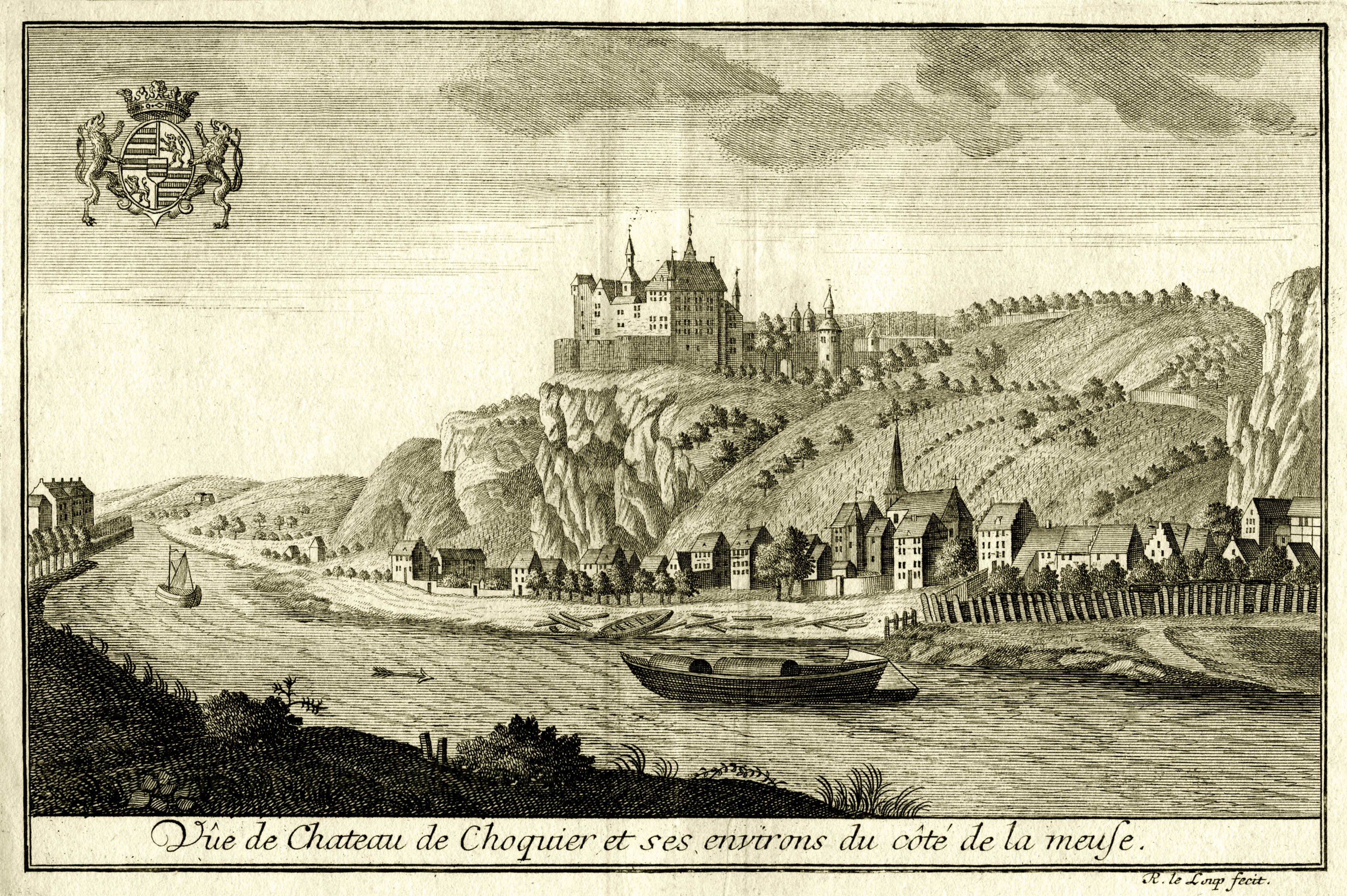 Vue du Château de Choquier et ses environs du côté de la Meuse